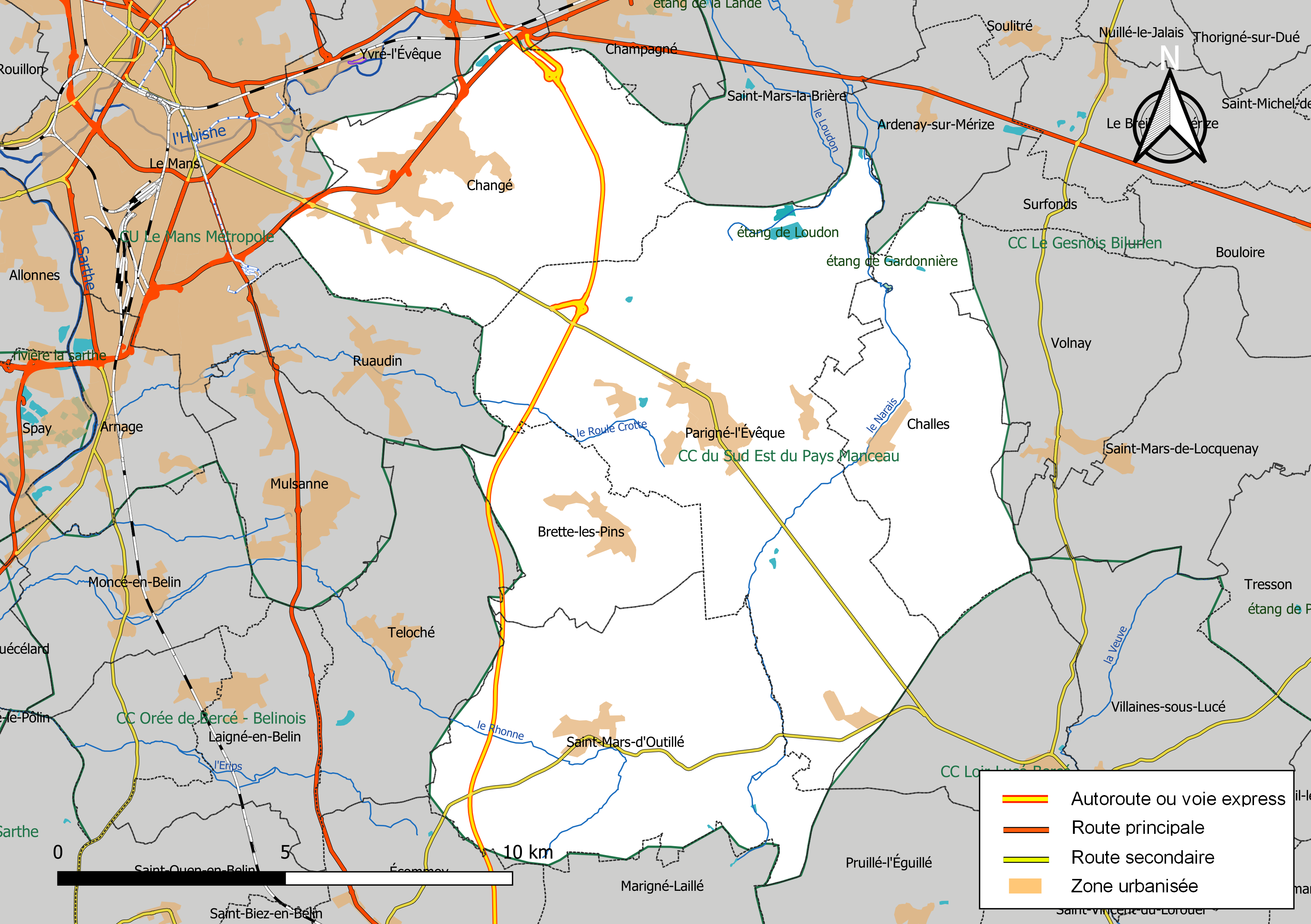 Carte géographique de la Communauté de communes du Sud-Est du Pays Manceau, département de la Sarthe, France. Composition au 1er janvier 2019.